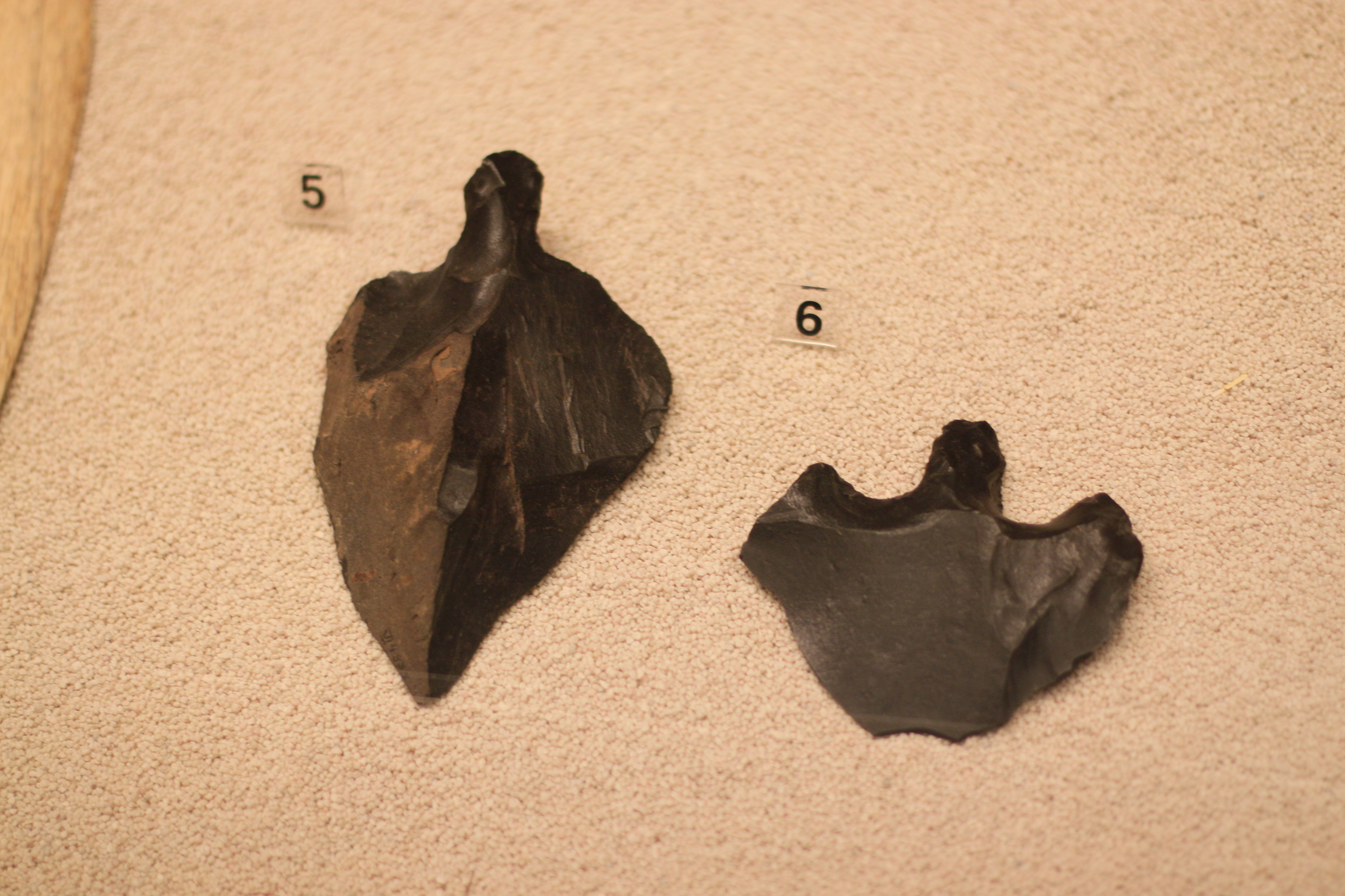 Speerspitzen von der Osterinsel, Südseebteilung im Ethnologischen Museum, Berlin-Dahlem, Sammlung Zentsch 1884 und Sammlung SMS Hyäne 1883